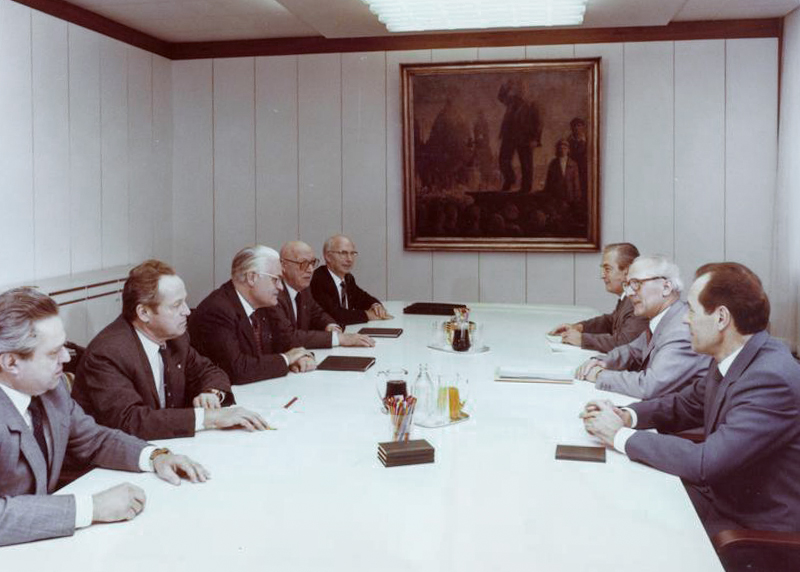 ADN-ZB / Franke / 10.12.82 Berlin: Zu einem vertrauensvollen Meinungsaustausch über die innen- und außenpolitischen Aufgaben, die auf der 5. Tagung des ZK der SED zur weiteren konsequenten Verwirklichung der Beschlüsse des X. Parteitages der SED beraten wurden, empfing der Generalsekretär des ZK der SED und Vorsitzende des Staatsrates der DDR, Erich Honecker, den Vorsitzenden der DBD, Dr. Ernst Mecklenburg (5.v.l.), den Vorsitzenden der CDU, Gerald Götting (3.v.l.), den Vorsitzenden der LDPD, Dr. Manfred Gerlach (2.v.l.), den Vorsitzenden der NDPD, Prof. Dr. Heinrich Homann (4.v.l.), und den Präsidenten des Nationalrates der Nationalen Front der DDR, Prof. Dr. Lothar Kolditz, (l.). An der Beratung nahmen Joachim Herrmann, Mitglied des Politbüros und Sekretär des ZK der SED (r.), und Waldemar Pilz, Abteilungleiter des ZK der SED (3.v.l.r.), teil. Information added by Wikimedia users.Alternative Personenzuschreibung, von links nach rechts: Lothar Kolditz (Präsident des Nationalrates), Manfred Gerlach (LDPD), Gerald Götting (CDU), Heinrich Homann (NDPD), Ernst Mecklenburg (DBD), Waldemar Pilz, Erich Honecker und Joachim Herrmann (alle drei SED).